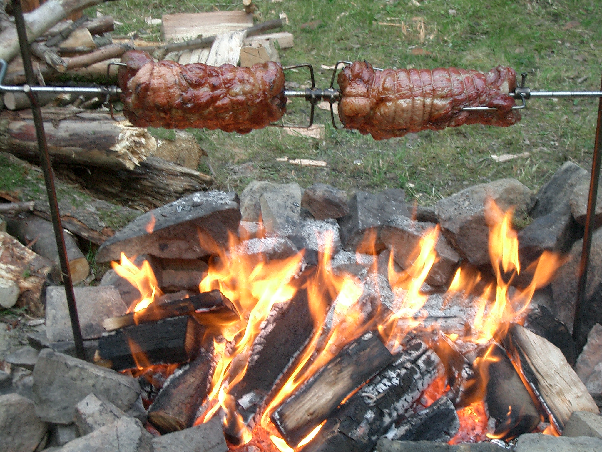 Obersteiner Spießbraten Andere Versionen